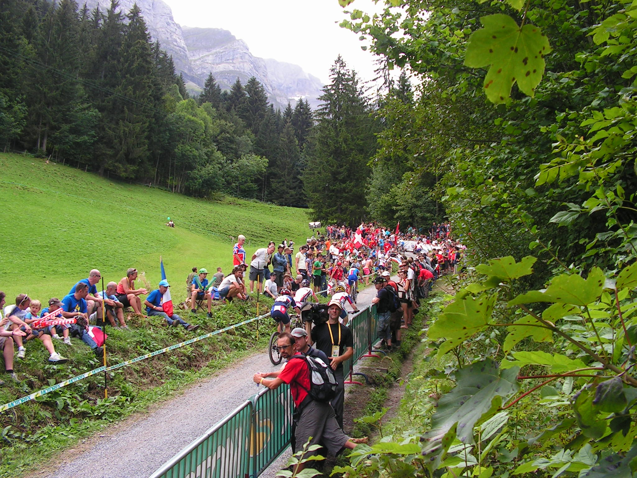 Photo réalisée lors de la dernière journée des championnats du Monde de VTT et de Trial à Champéry. Course VTT Cross Country homme et femme